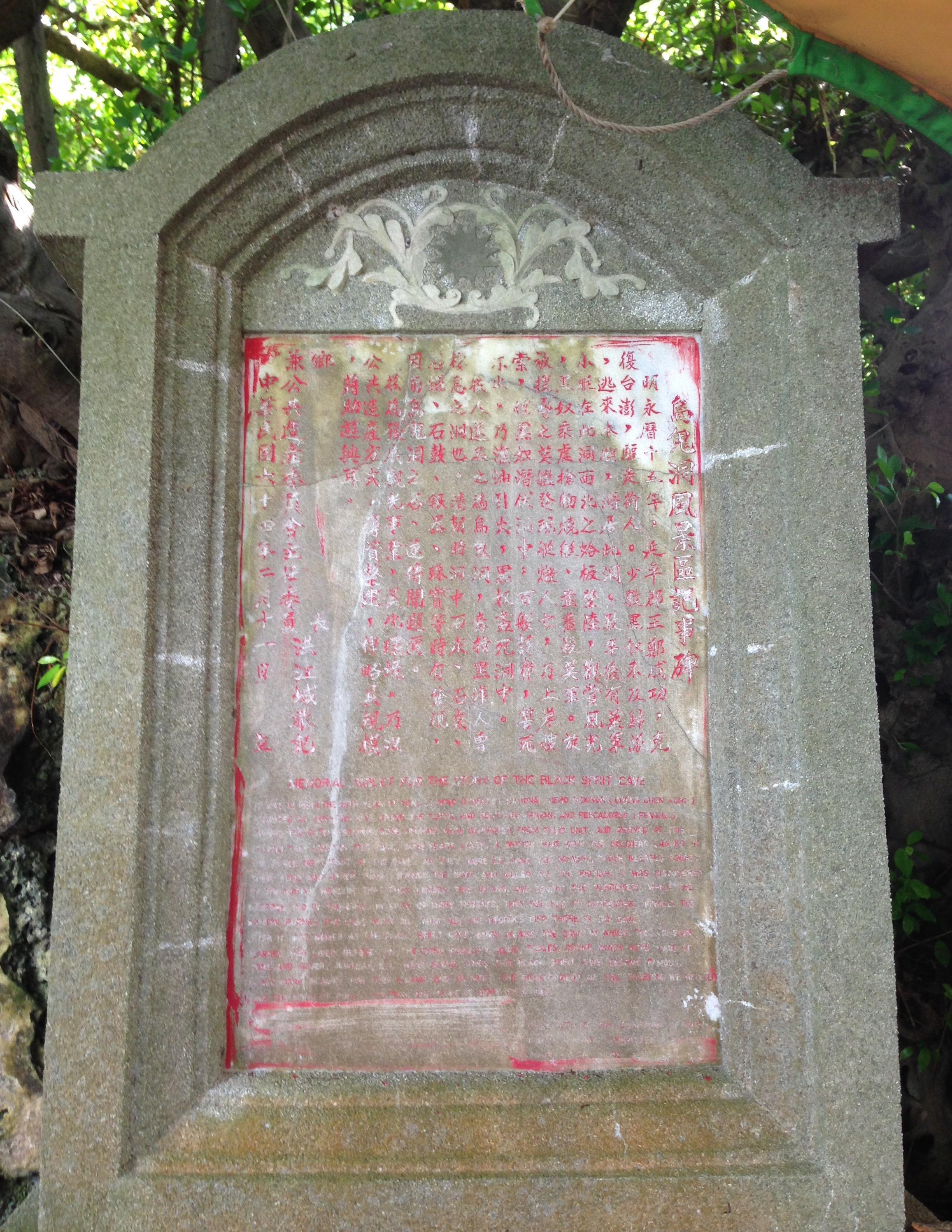 中文（台灣）: 烏鬼洞風景區記事碑